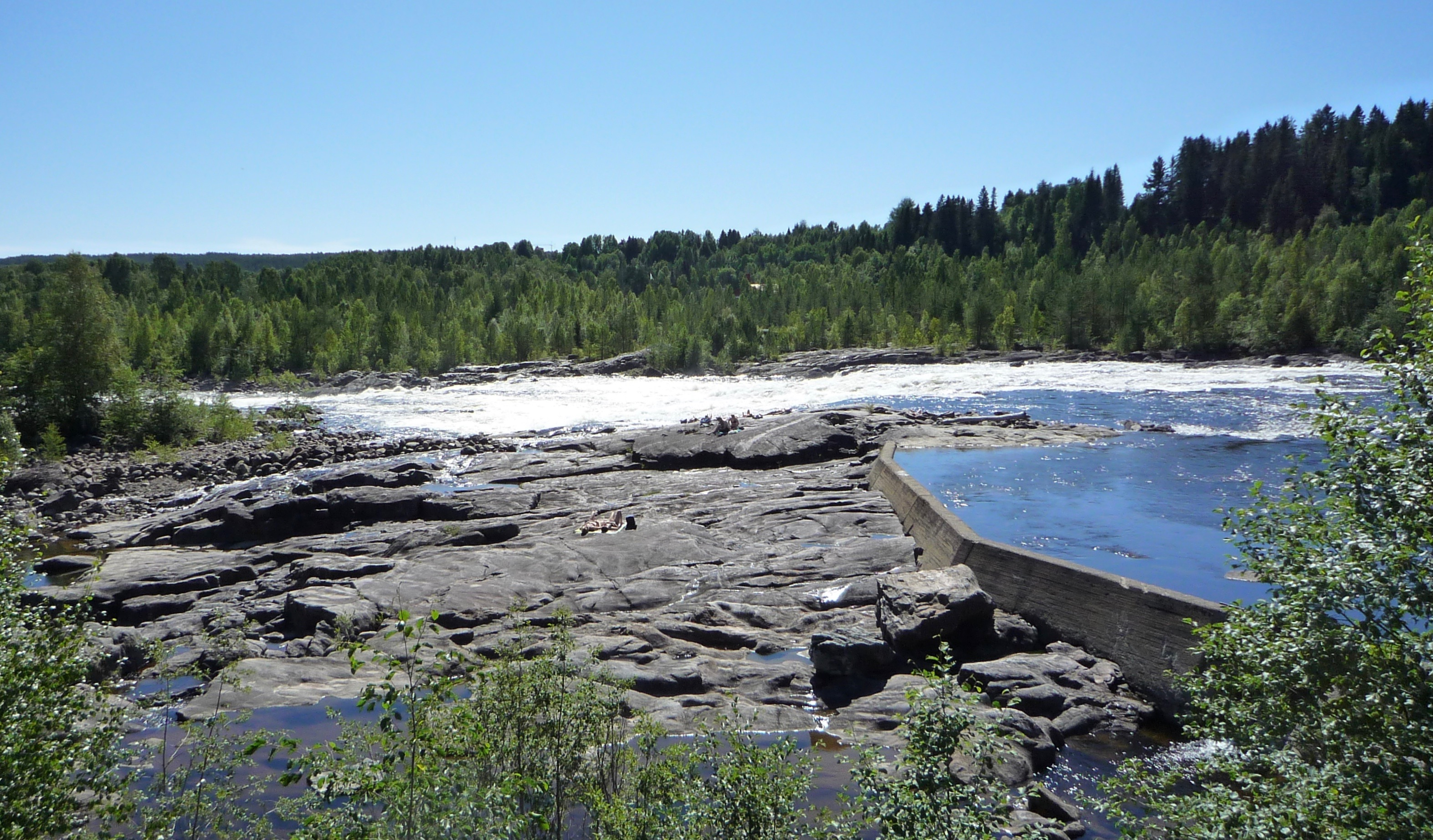 Forsen vid Baggböle är populär bland solbadare.